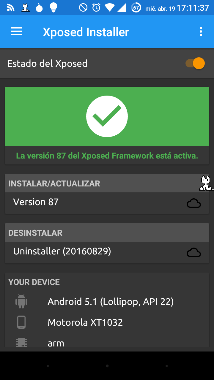 Captura de pantalla de Xposed Framework en un Moto G3 con Android Lollipop